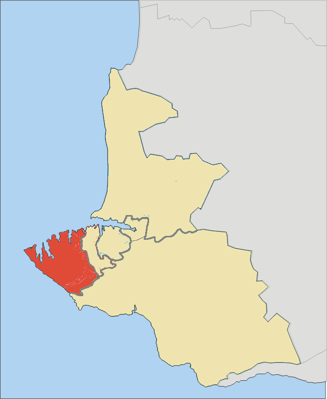 Гагаринский район Севастополя